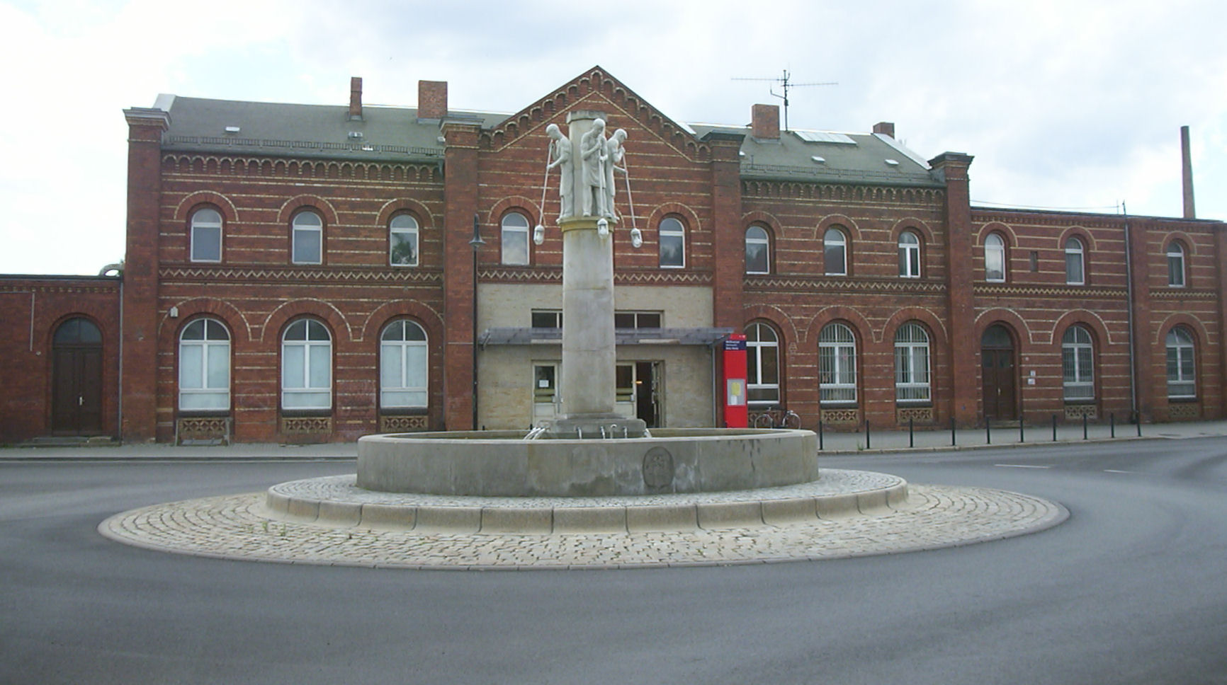 Glasmacherbrunnen vor dem Bahnhof Weißwasser Map: 51° 30′ 21″ N, 14° 38′ 18″ E